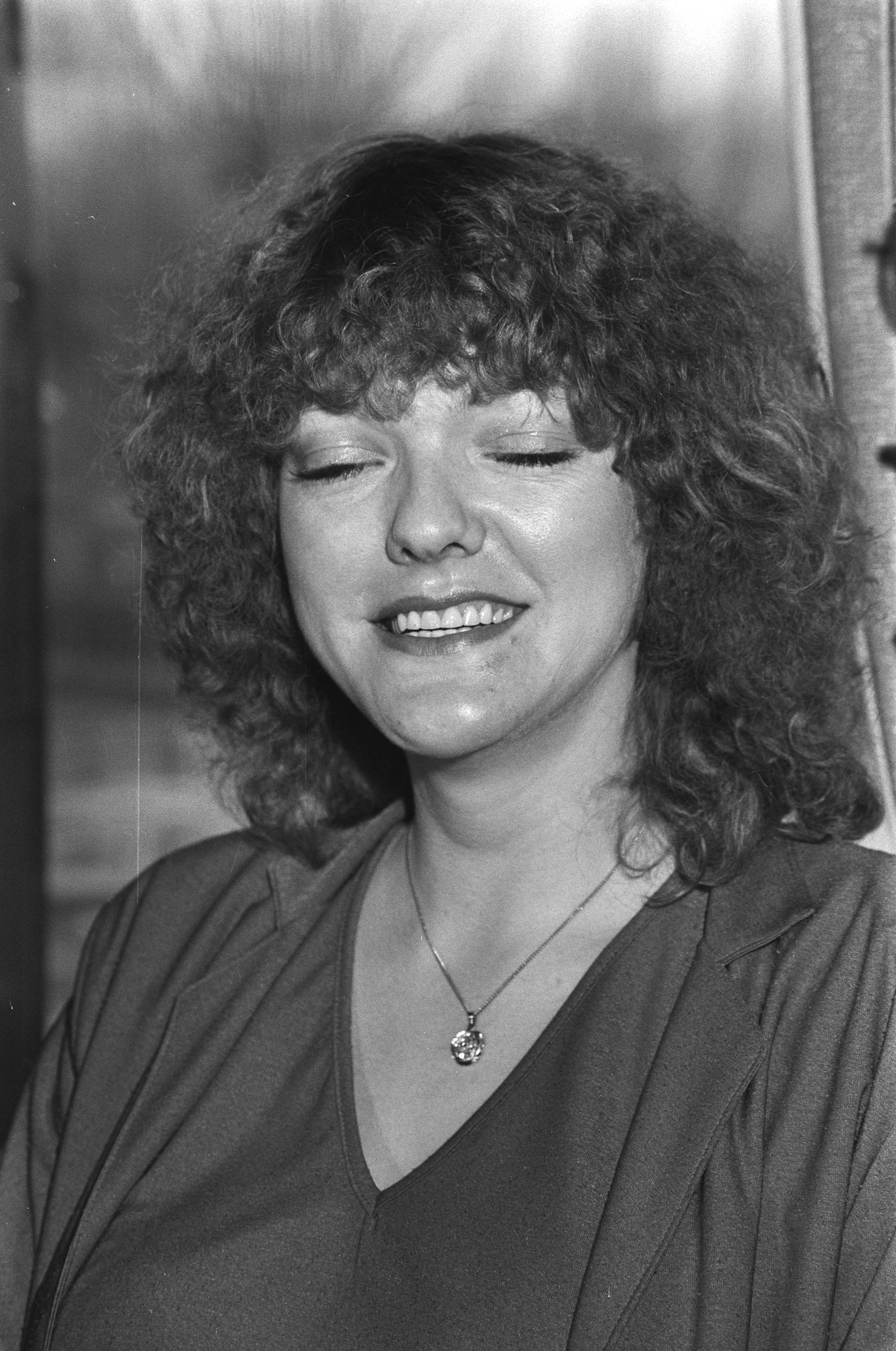 Collectie / Archief : Fotocollectie Anefo Reportage / Serie : Uitreiking "Kruiwagen" en "Conamus Export Prijs" tijdens radioprogramma Open House Beschrijving : Uitreiking "Kruiwagen" en " Export Prijs" tijdens radioprogramma Open House . Miggy Datum : 31 december 1981 Trefwoorden : RADIOPROGRAMMAS, Uitreikingen Fotograaf : Dijk, Hans van / Anefo Auteursrechthebbende : Nationaal Archief Materiaalsoort : Negatief (zwart/wit) Nummer archiefinventaris : bekijk toegang 2.24.01.05 Bestanddeelnummer : 931-8887